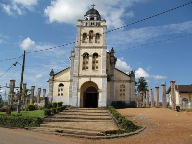 édifice monumentale d'Edéa